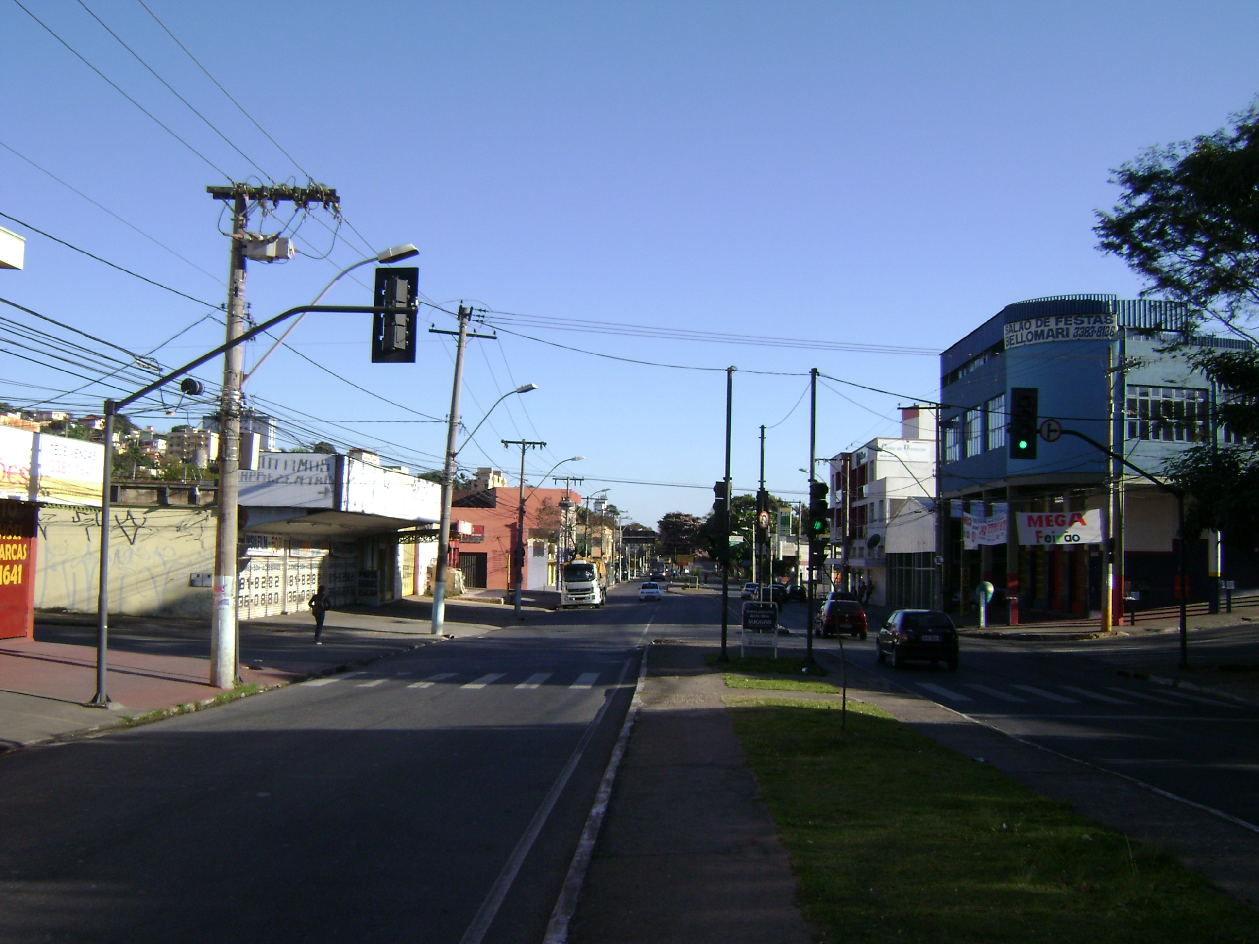 Avenida Olinto Meireles, em Belo Horizonte.